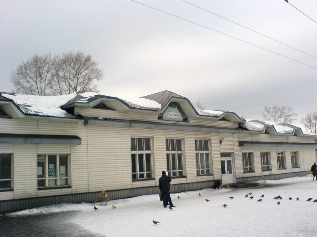 жд-станция Плесецкая